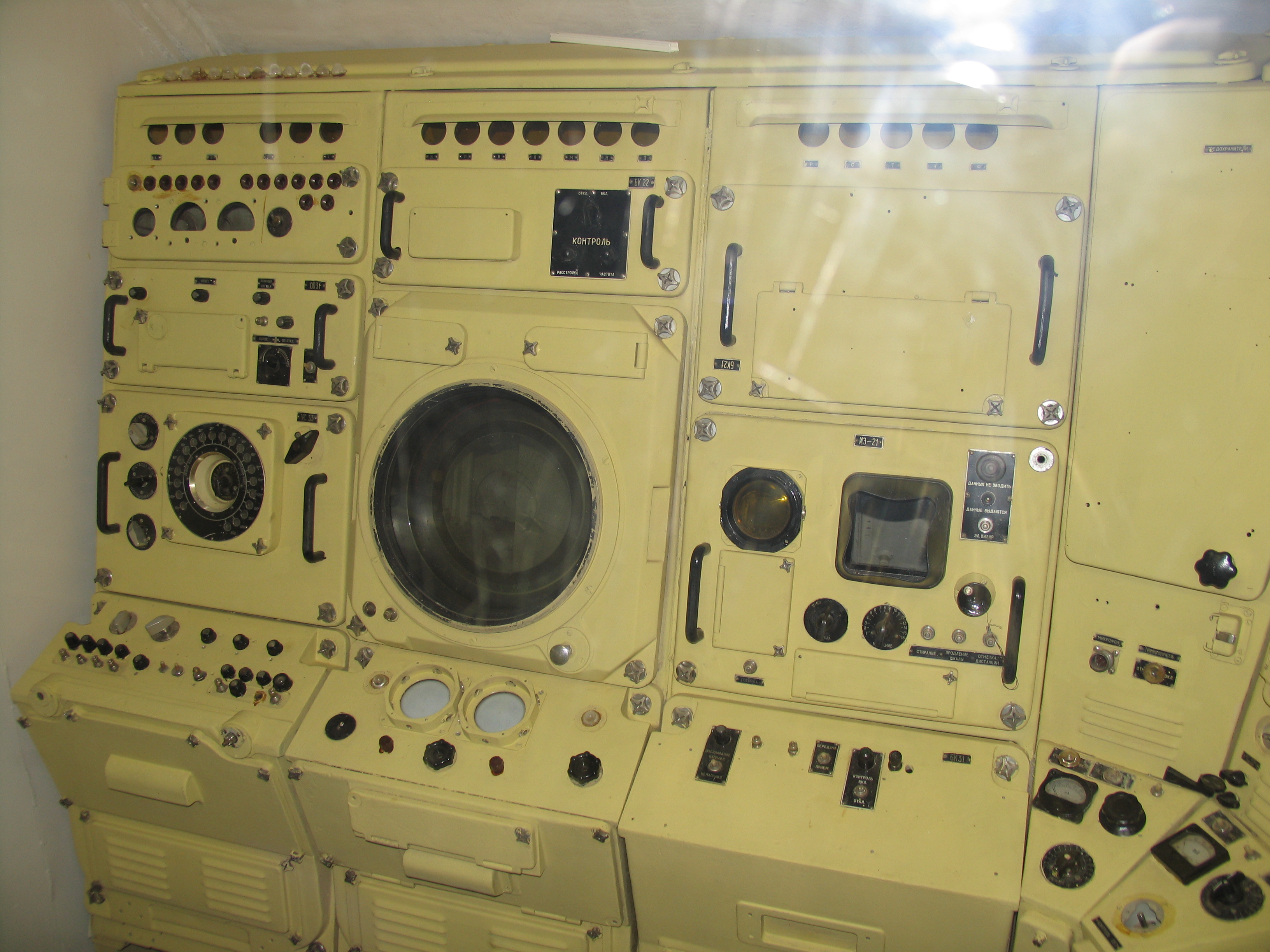 Подводная лодка Б-396. Третий отсек. Гидроакустическая станция.